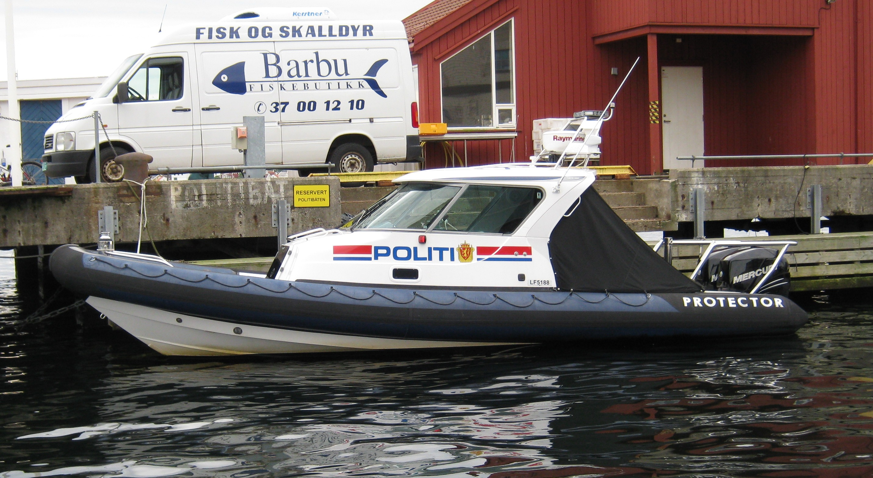 Politibåt (RIB) i Arendal